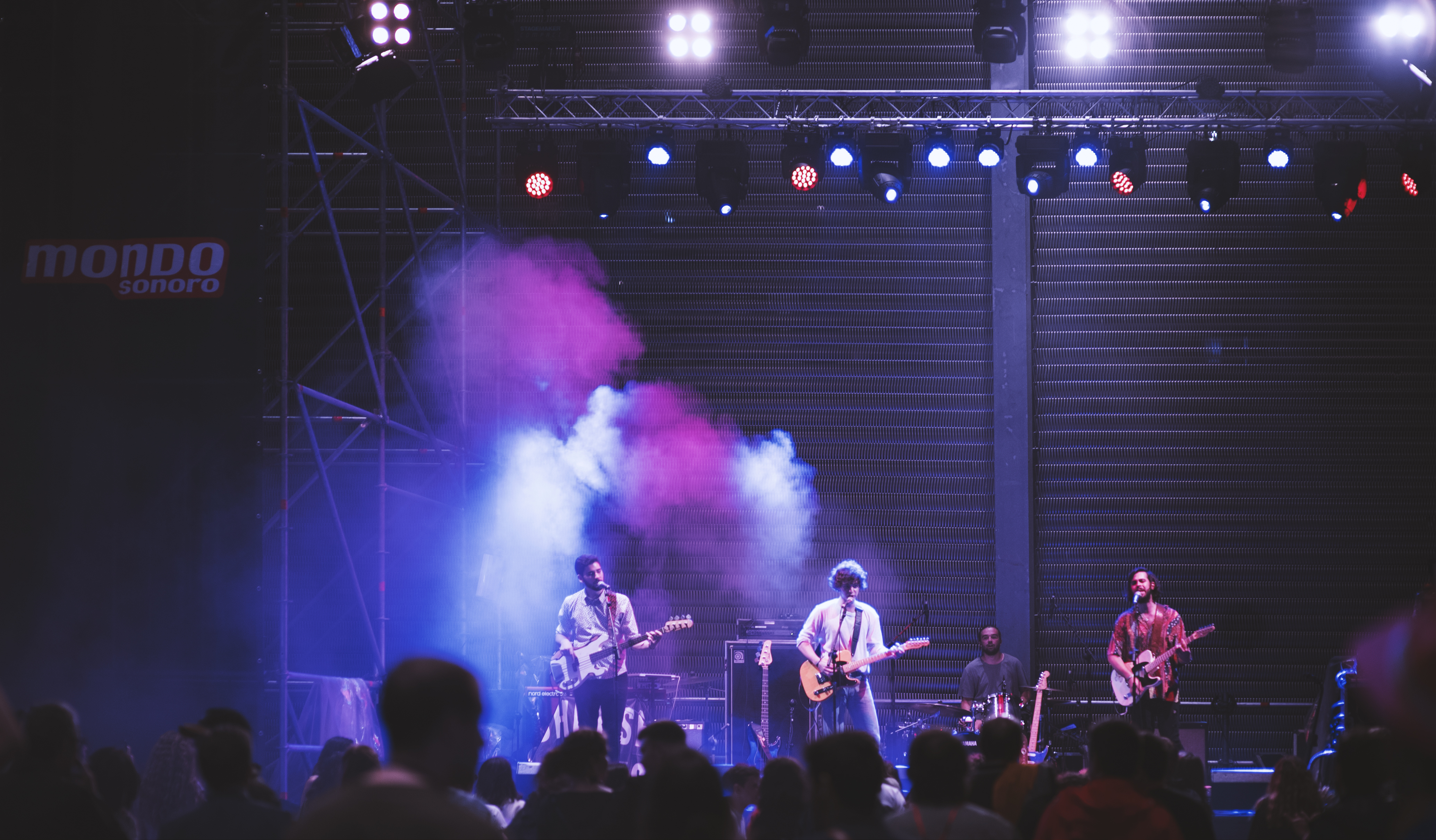 Chelsea Boots durante su concierto en el MadCool 2017